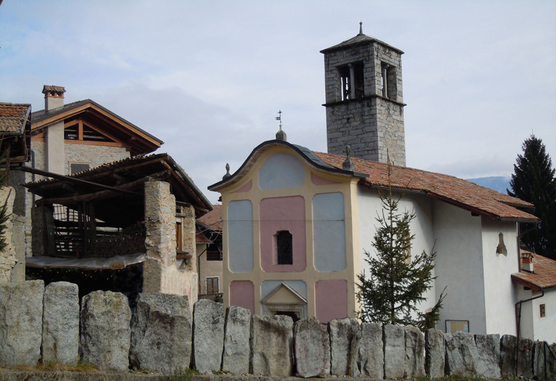 Rango, chiesa parrocchiale.